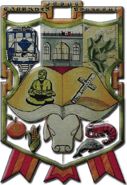 Escudo del Municipio de Jesús Carranza